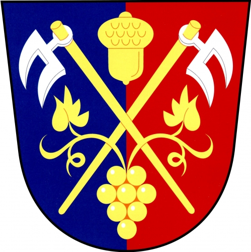 znak, Dobelice, okres Znojmo